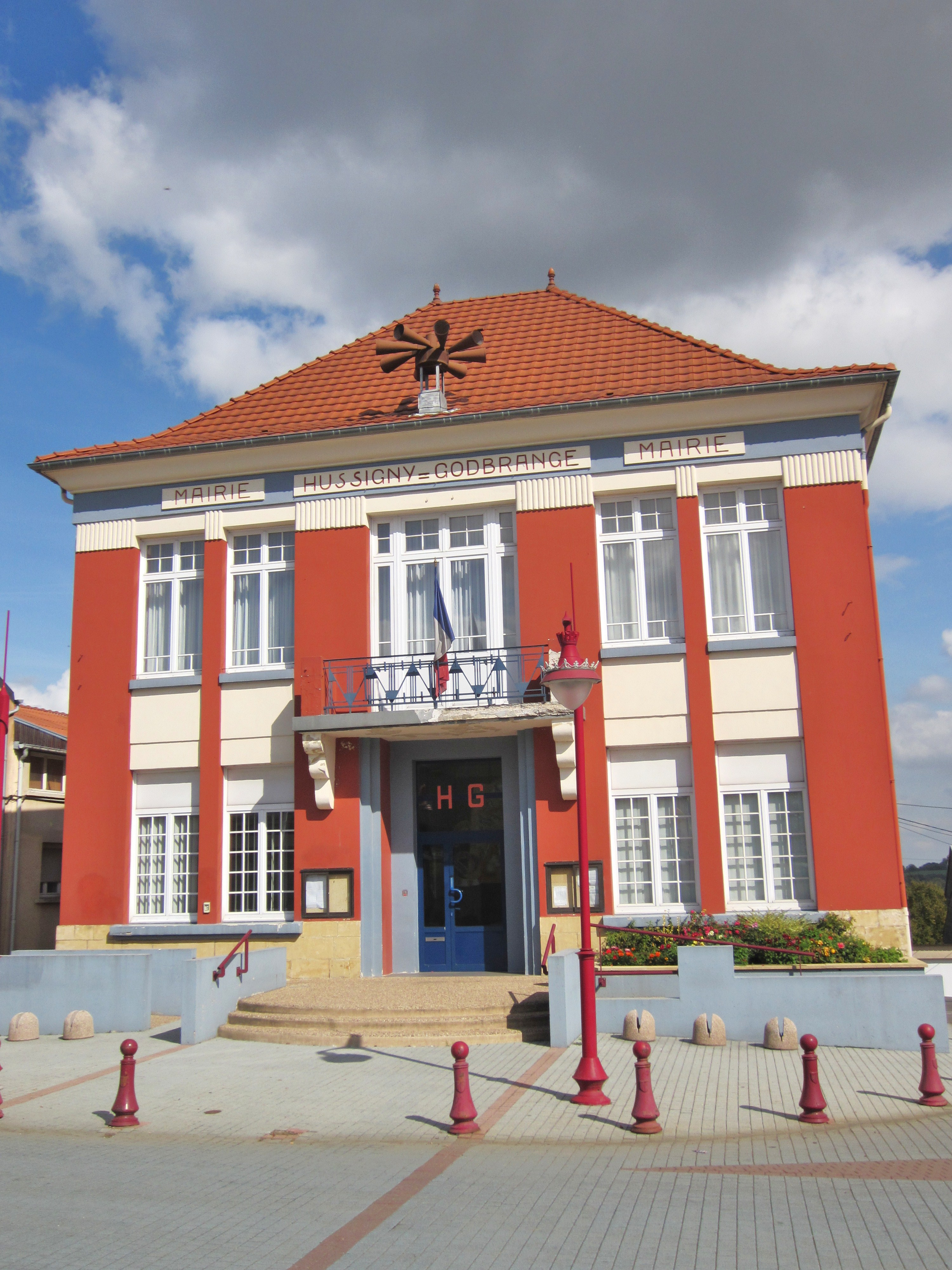 Description mairie Hussigny mairie Hussigny